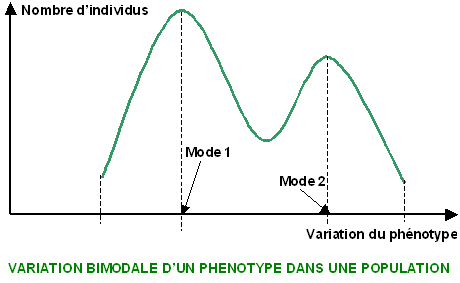 Exemple de courbe bimodale dans le cadre d'une variation phénotypique d'une population d'individus